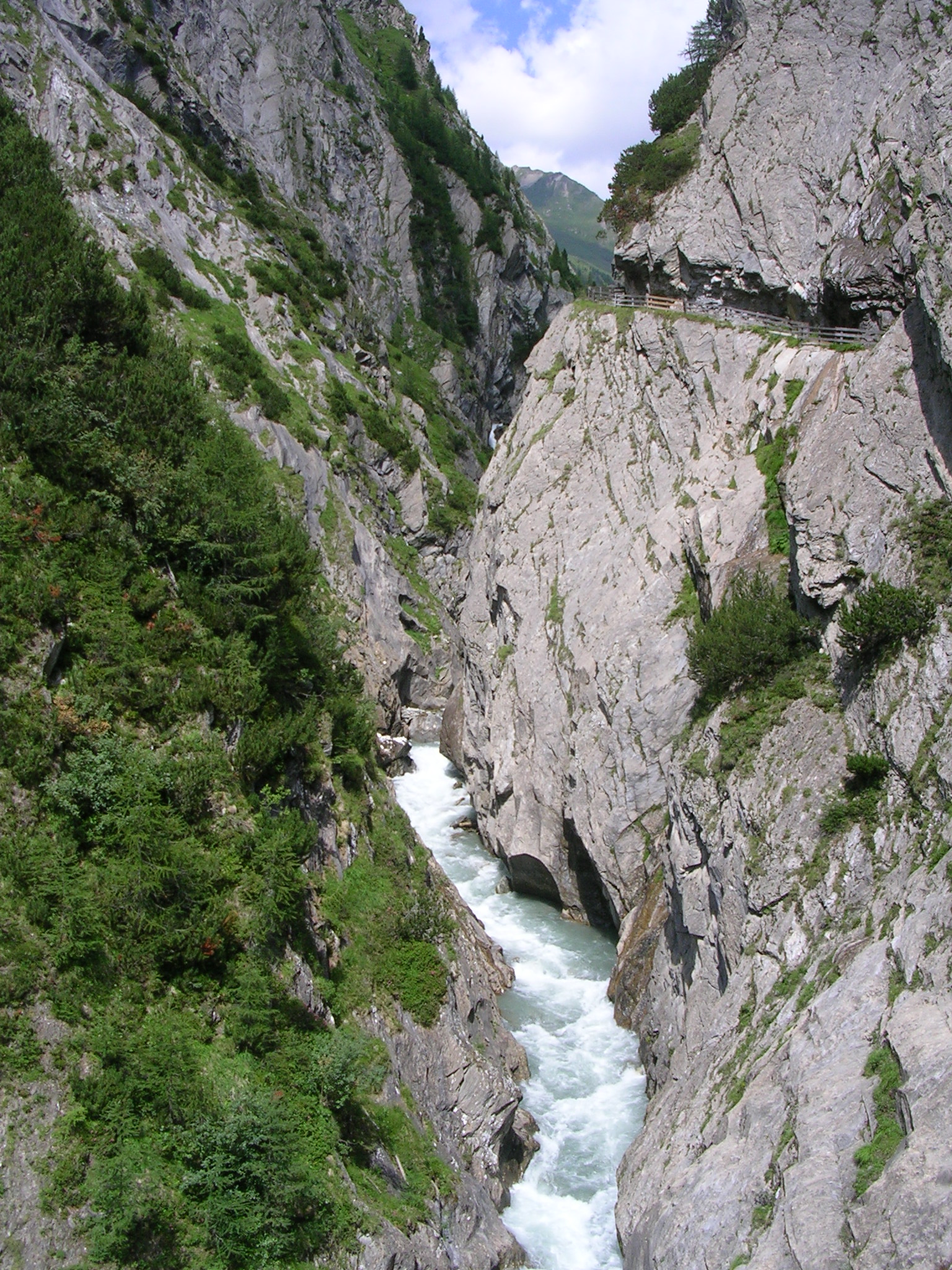 Die Daberklamm vor dem Kalser Dorfertal in Osttirol, Bezirk Lienz.. This file shows the National Park Hohe Tauern in Austria.